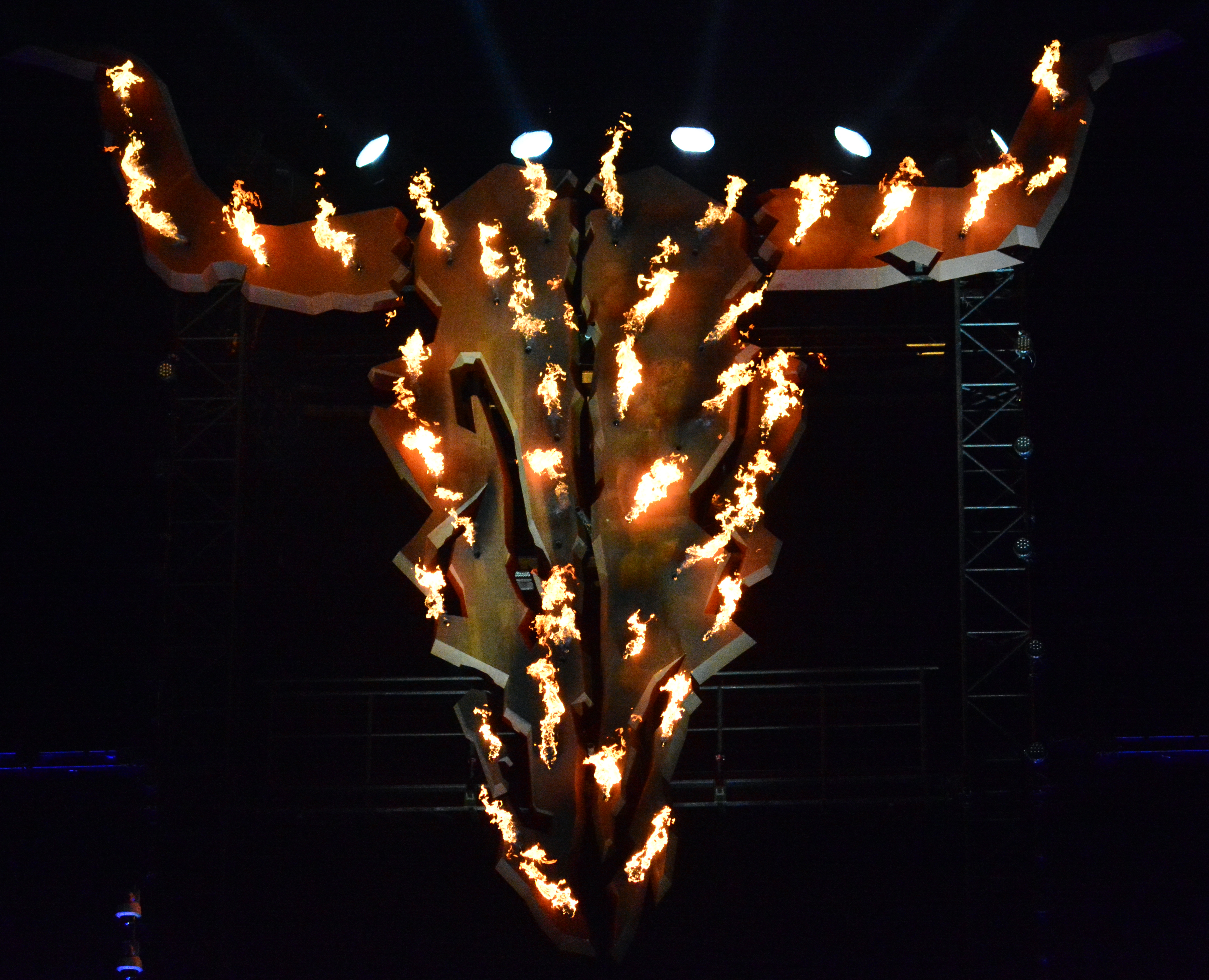 Brennender Schädel zwischen den beiden Hauptbühnen auf dem Wacken Open Air 2014